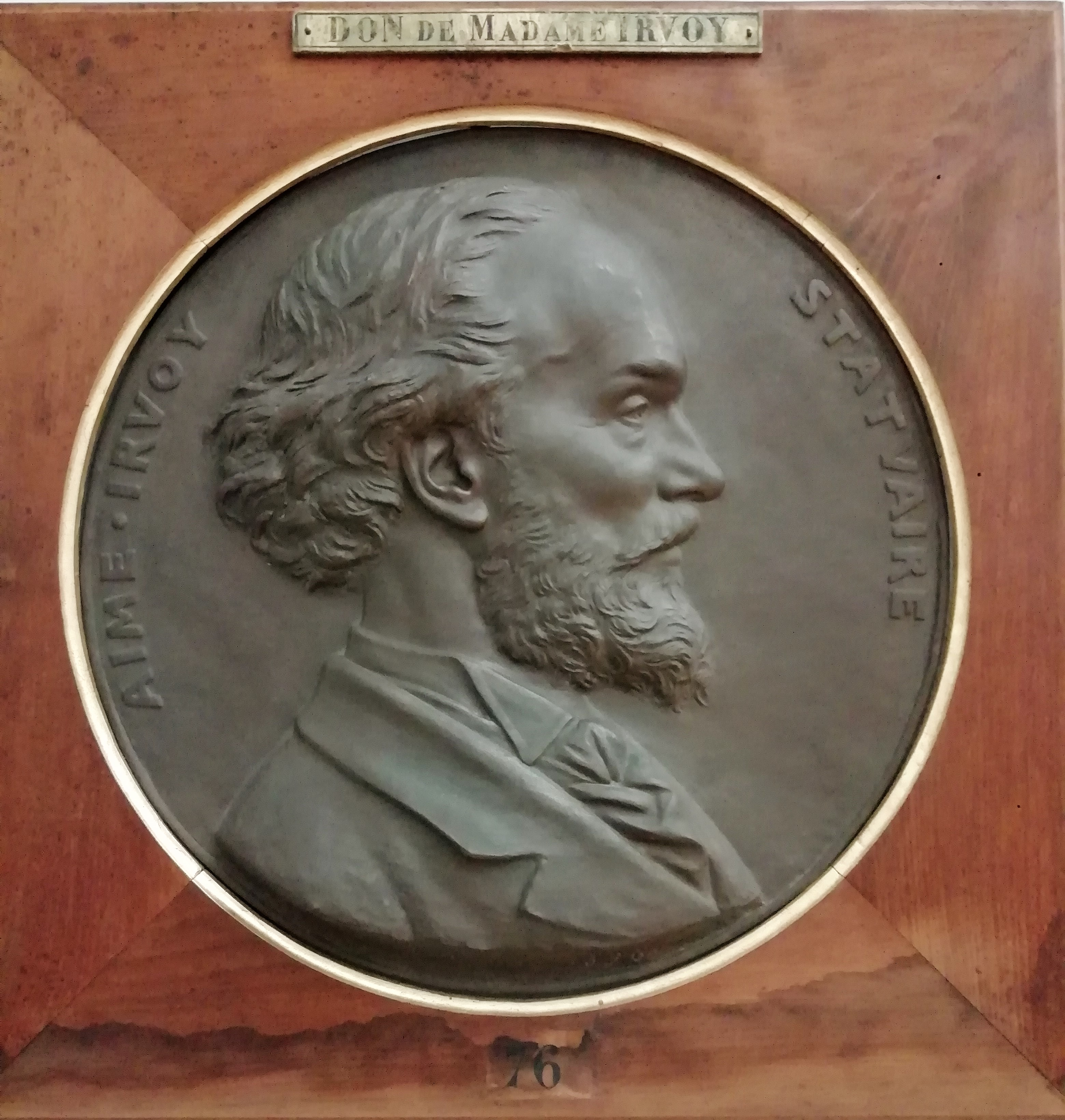 Aimé Irvoy, 1898, par Gabriel Jules Thomas (Paris, 1824 - idem, 1905). Médaillon en bronze, Don de Mme Irvoy en 1899. Informations tirées de la plaquette de l'Exposition temporaire "Grenoble et ses artistes au XIXe siècle" au Musée de Grenoble.